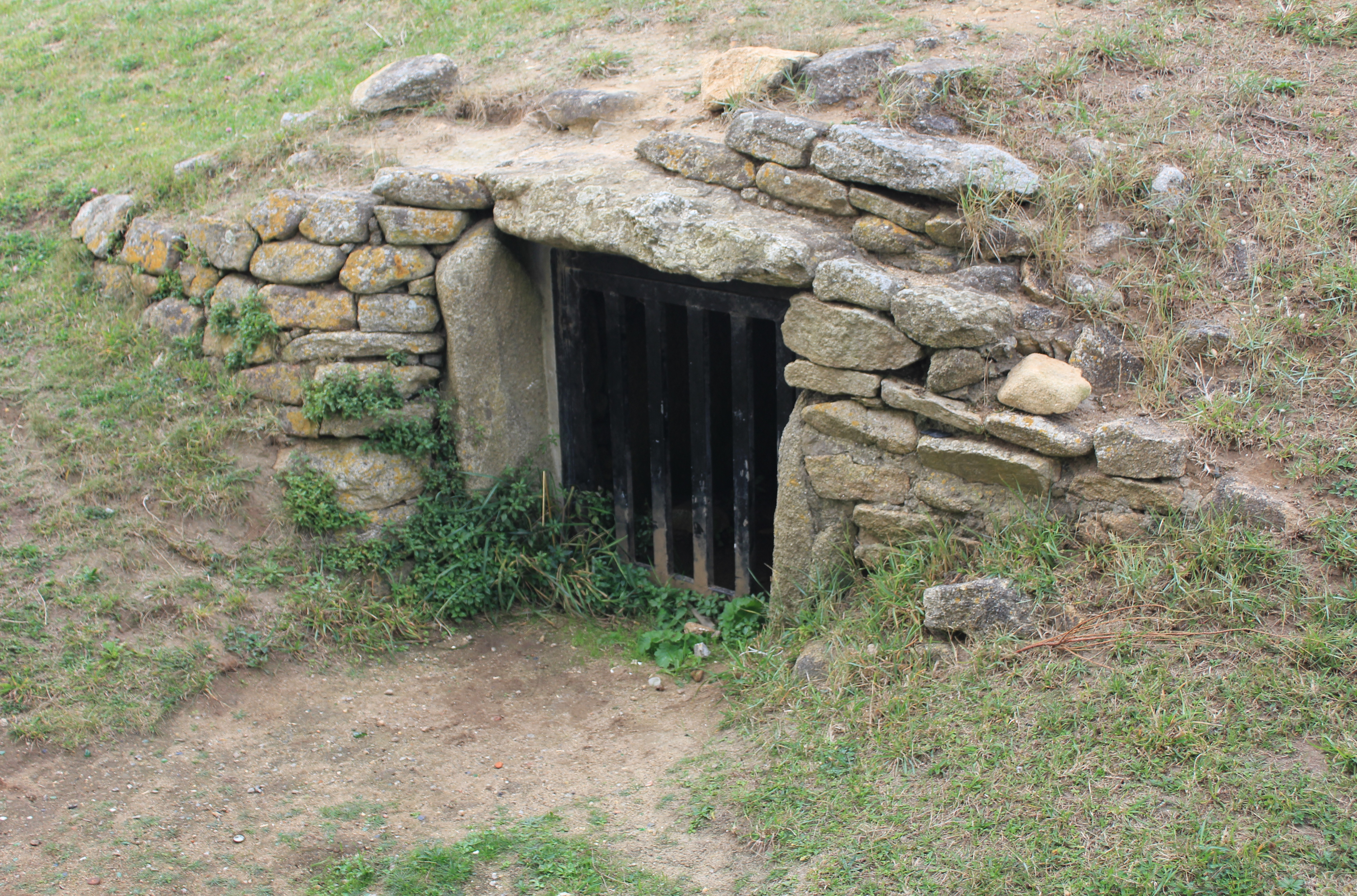 Dolmen de Goëren : vue de l'entrée depuis le sud-est .